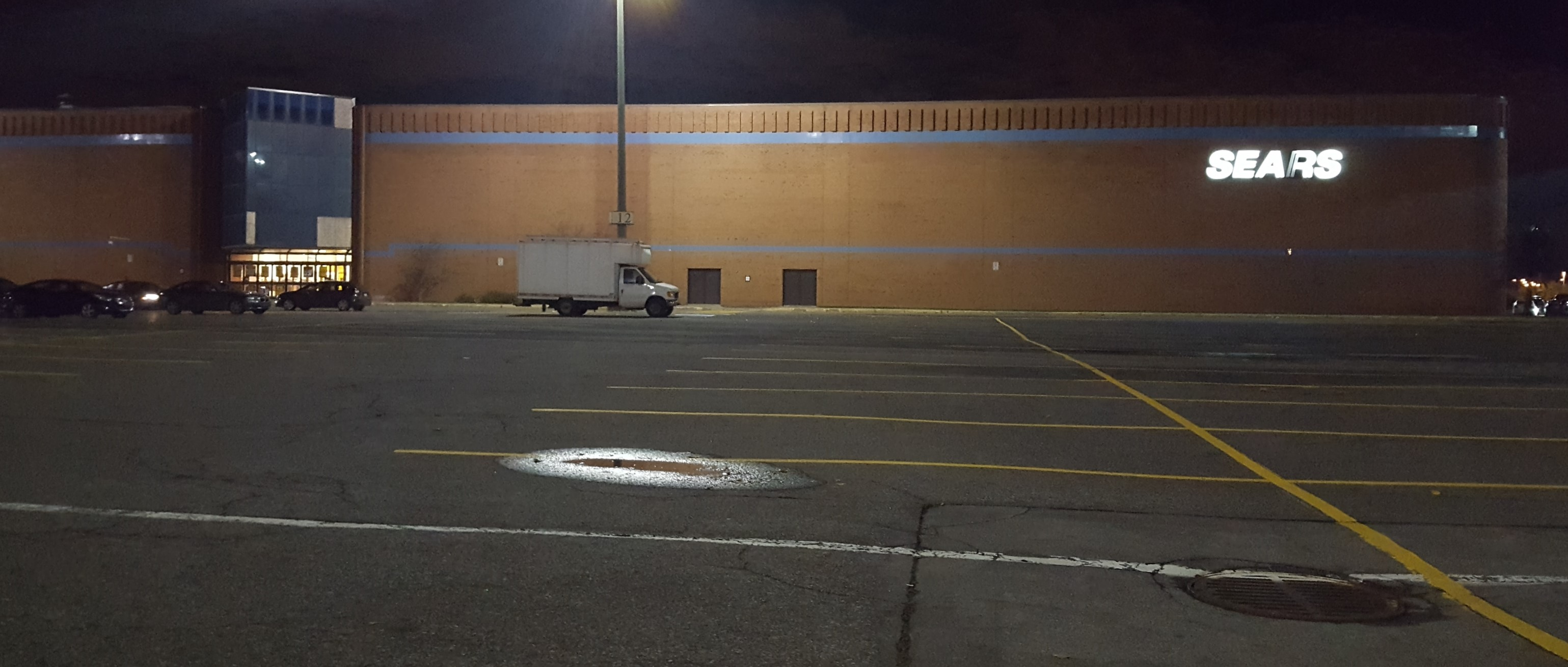 Sears 700 Boulevard des Promenades, Saint-Bruno-de-Montarville, QC 2